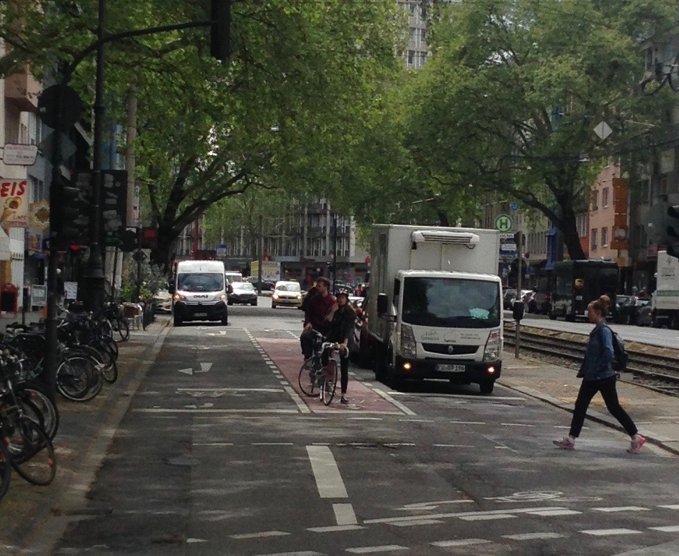 Fahrradfahrer*innen auf der Fahrradweiche am Zülpicher Platz in Köln